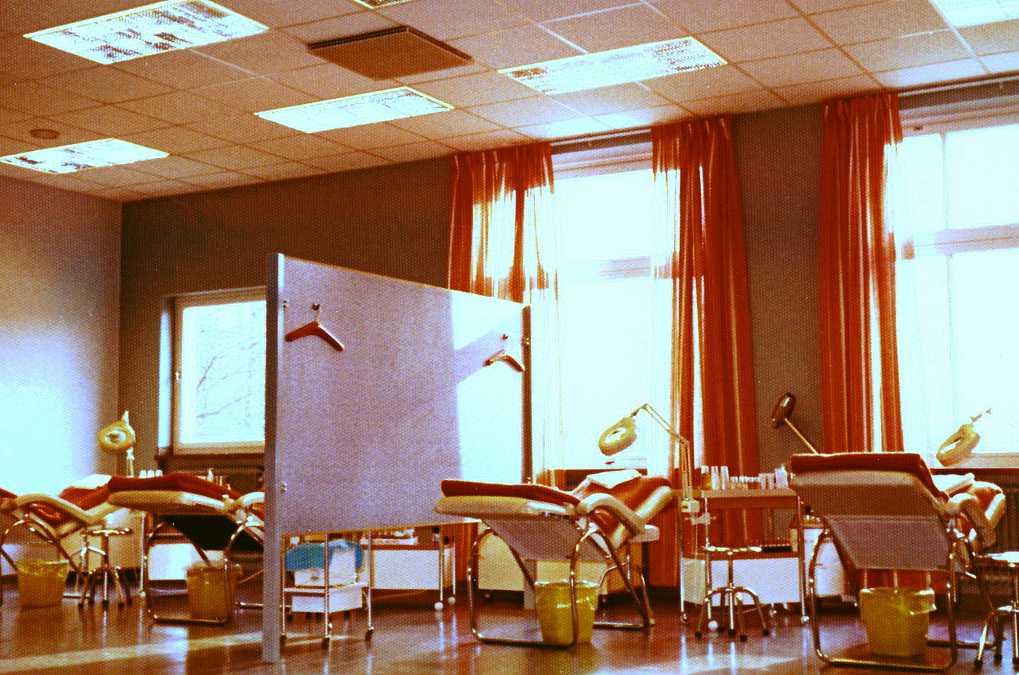 Nya Elemnentar, Bromma, kosmetologutbildningens behandlingssal